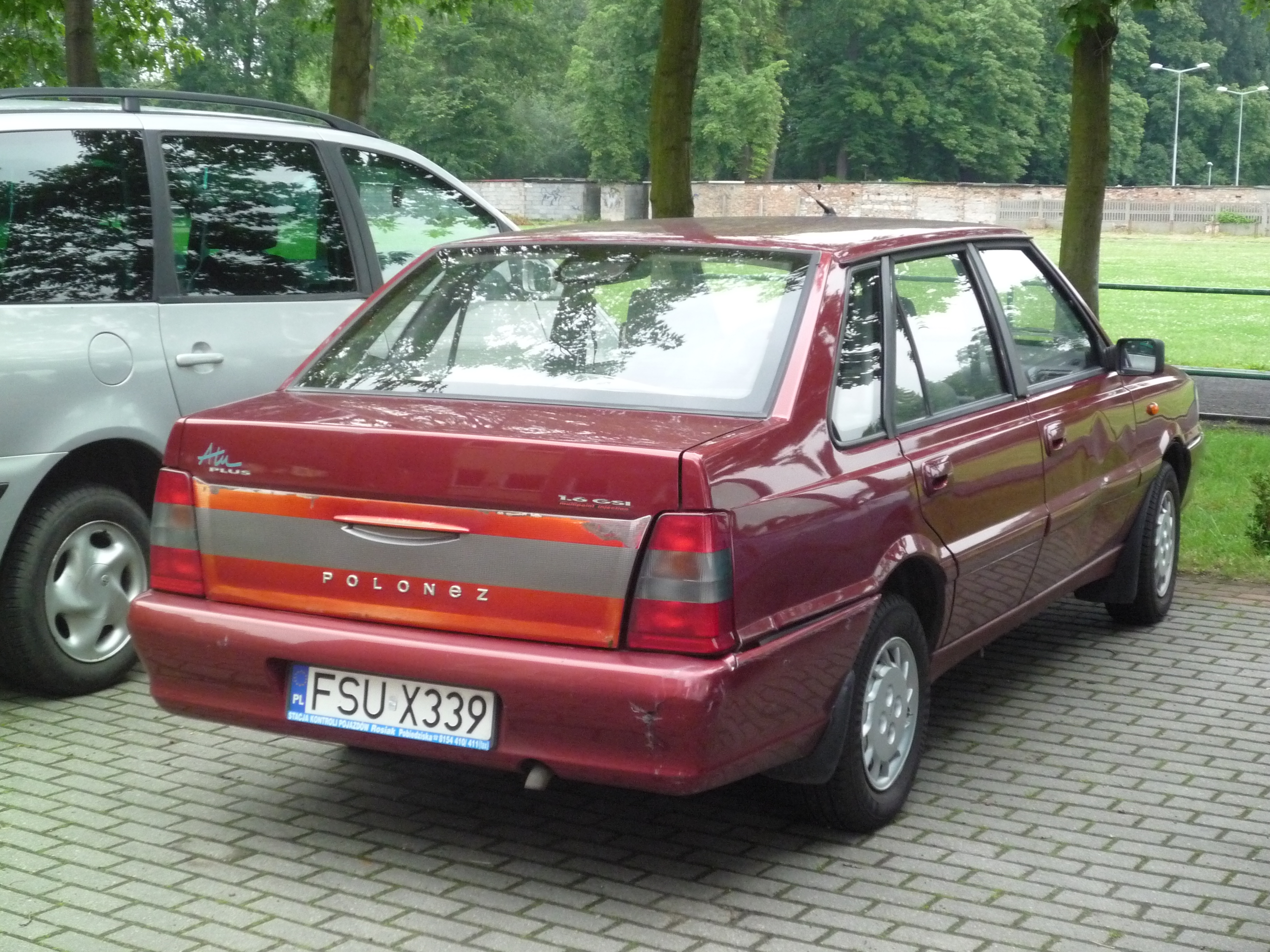 Daewoo-FSO Polonez Atu Plus 1.6 GSI w Słubicach.